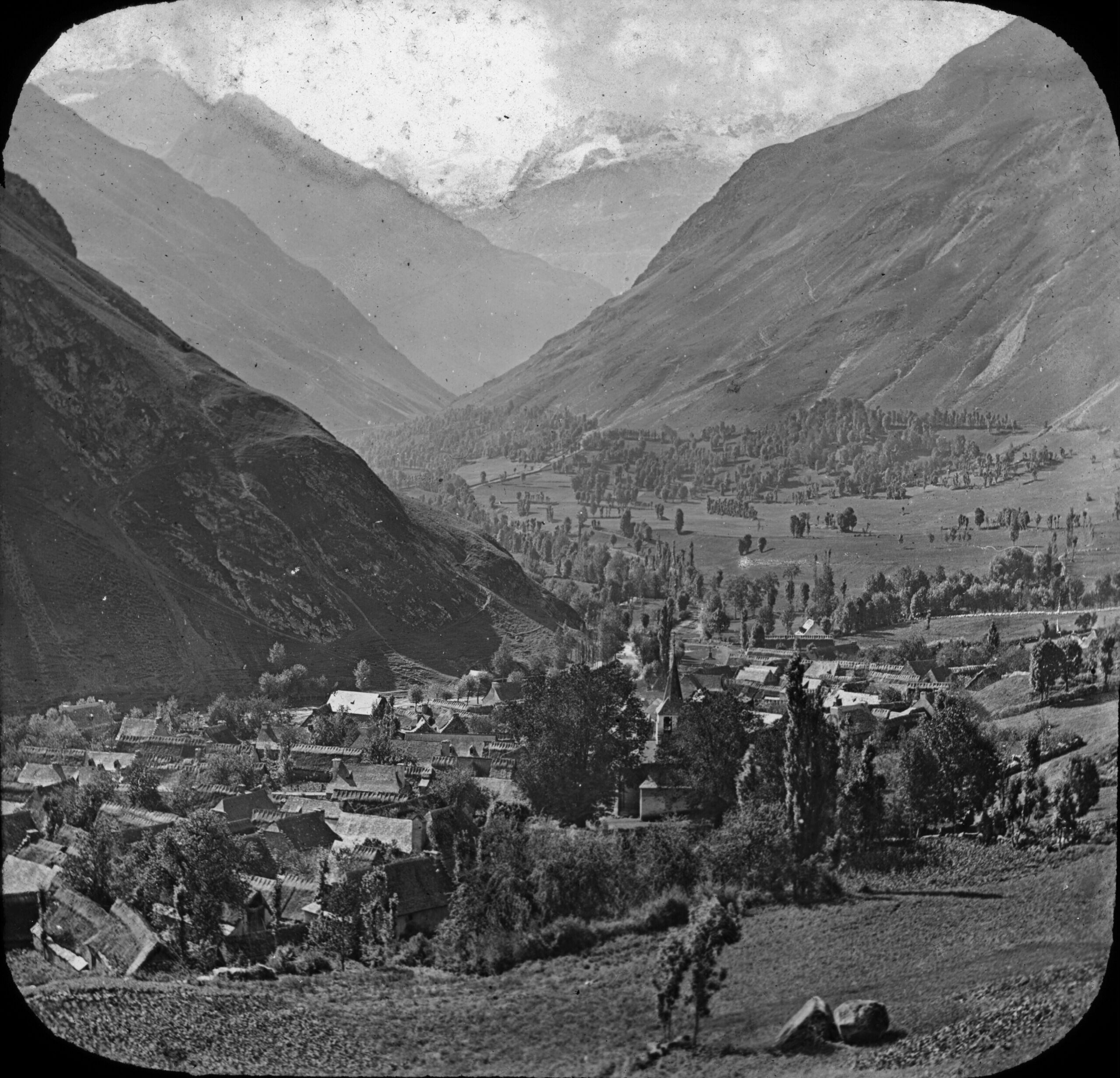 Fonds Trutat - Photographie ancienne Cote : TRU C 277 Localisation : Fonds ancien Original non communicable Titre : Panorama d'Oô, village d'Oô, 1941 Lieu de création : Bagnères-de-Luchon (Haute-Garonne ; canton) Date de création : : 1941 Mesures : 9 x 10 cm Mot(s)-clé(s) : -- Vallée -- Montagne -- Pic (montagne) -- Neige -- Végétation -- Herbe -- Arbre -- Village -- Oô (France ; haute-vallée) -- Oô (Haute-Garonne) -- Bagnères-de-Luchon (Haute-Garonne ; canton) -- Luchonnais, Massif du (France) -- 20e siècle, 2e quart Médium : Photographies -- Noir et blanc -- Positifs au collodion sur plaque de verre -- Paysages de montagne Bibliothèque de Toulouse. Domaine public